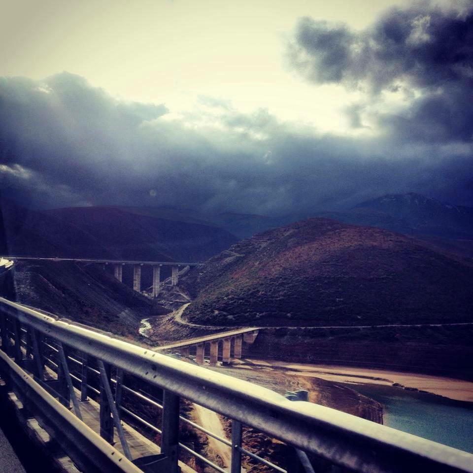 pamje e ures e nderthurur ne male